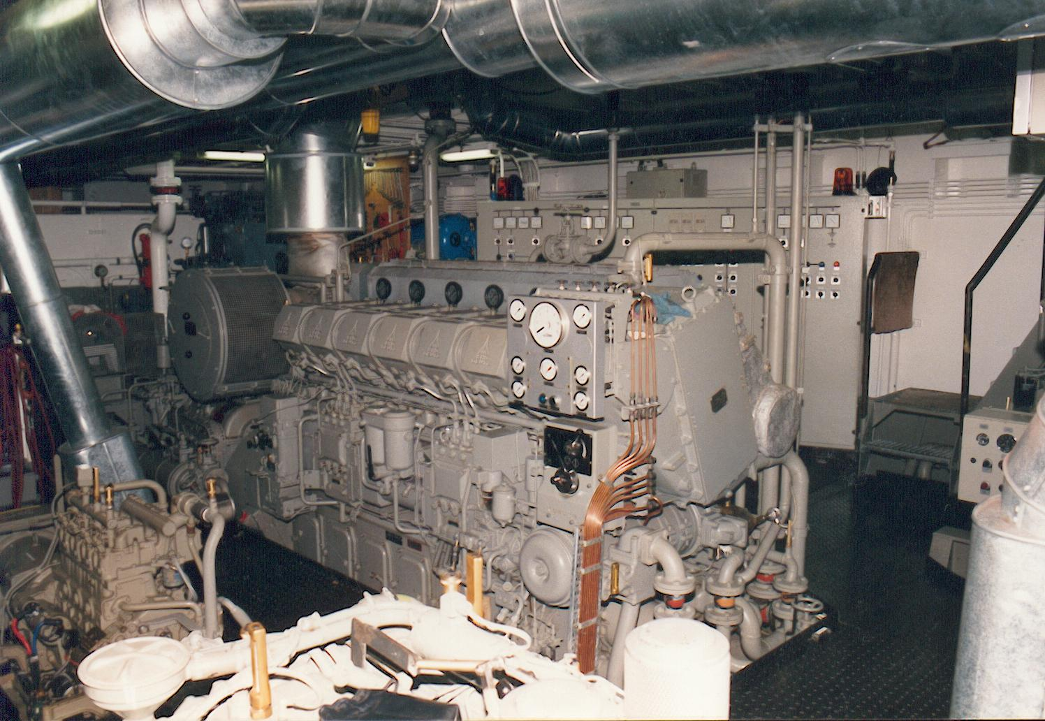 6-Zylinder-V-Schiffs-Dieselmotor der Deutz-Baureihe 628, 1200 PS (Originalangabe: 12 Zylinder)